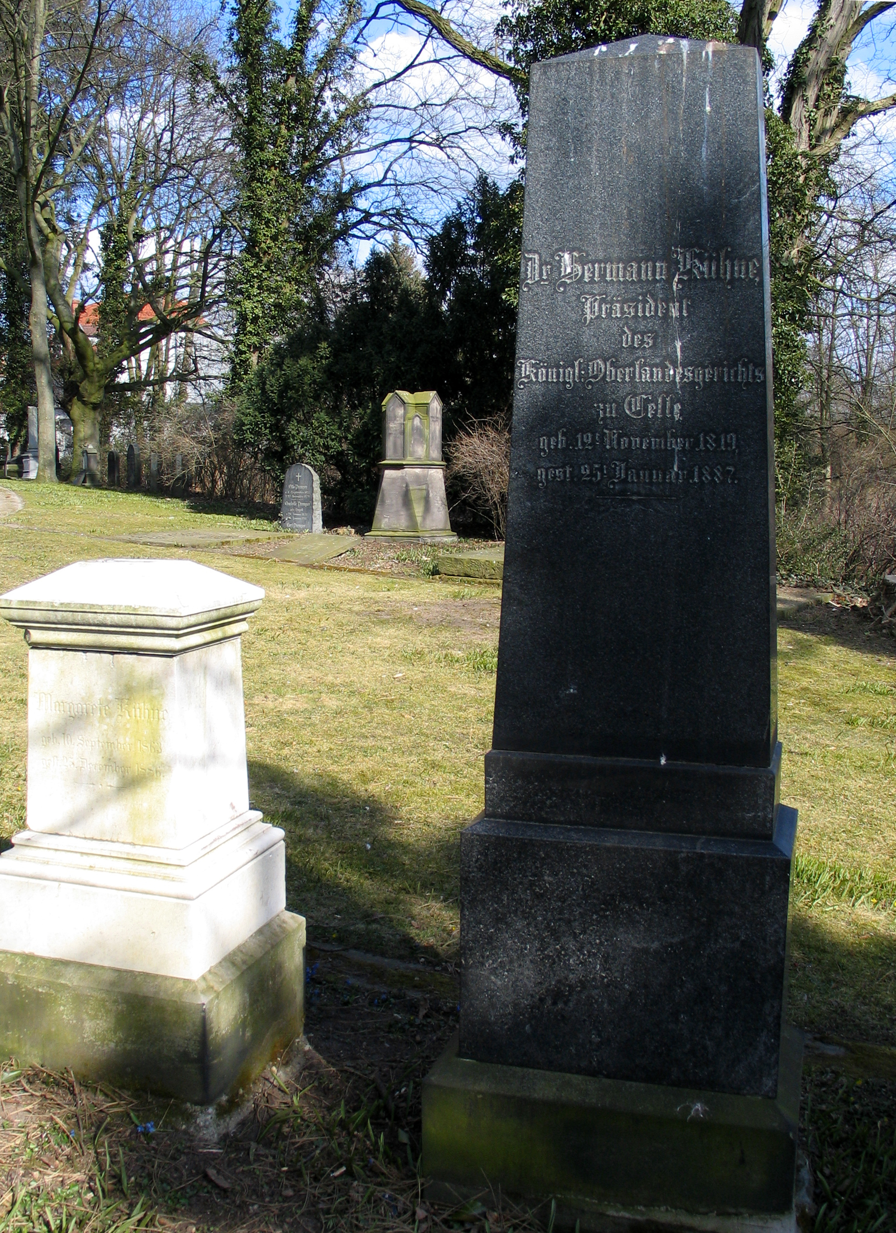 Foto vom Helentorfriedhof, östlicher Teil ...